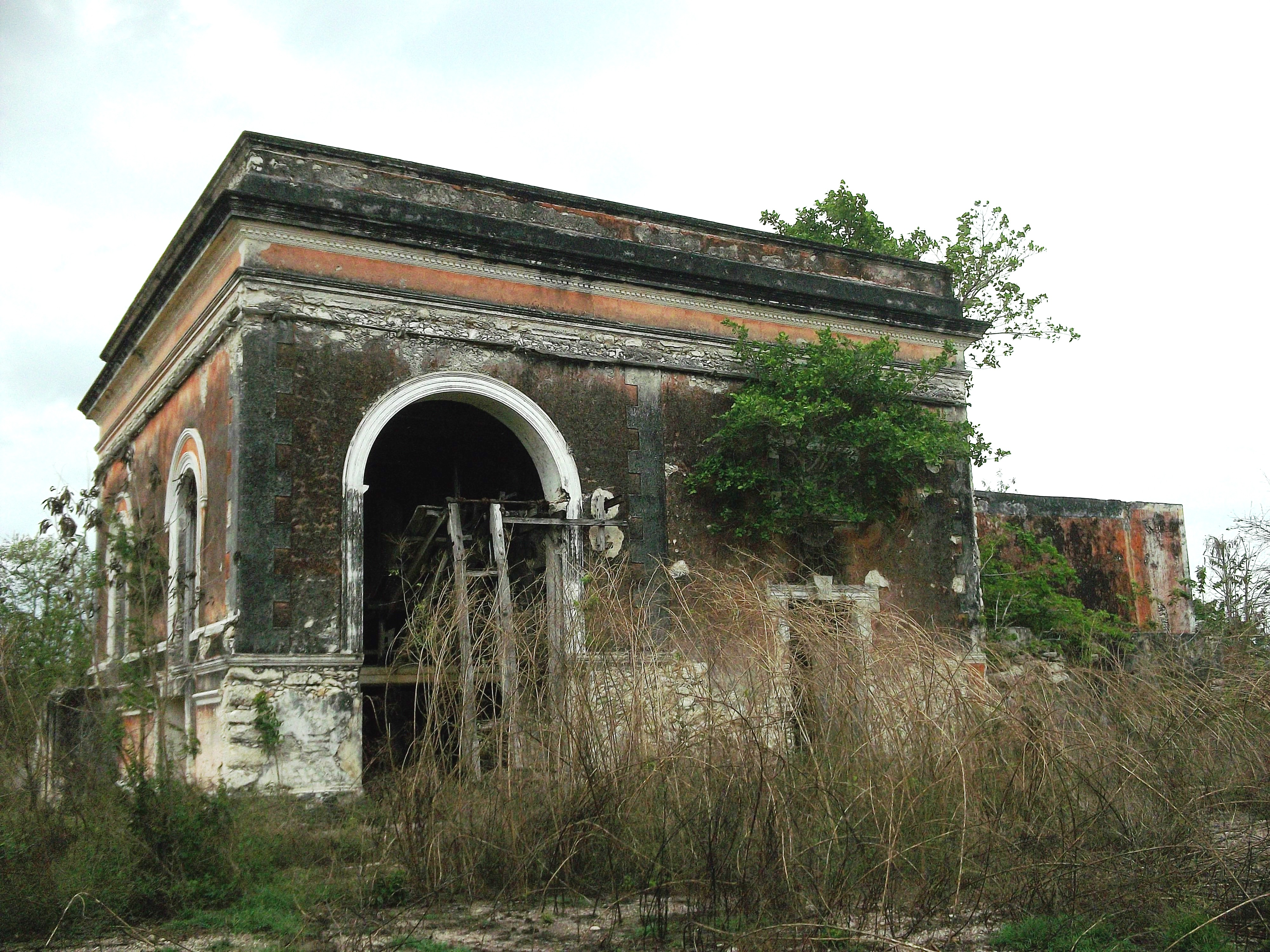 Vista de San Antonio Choil.